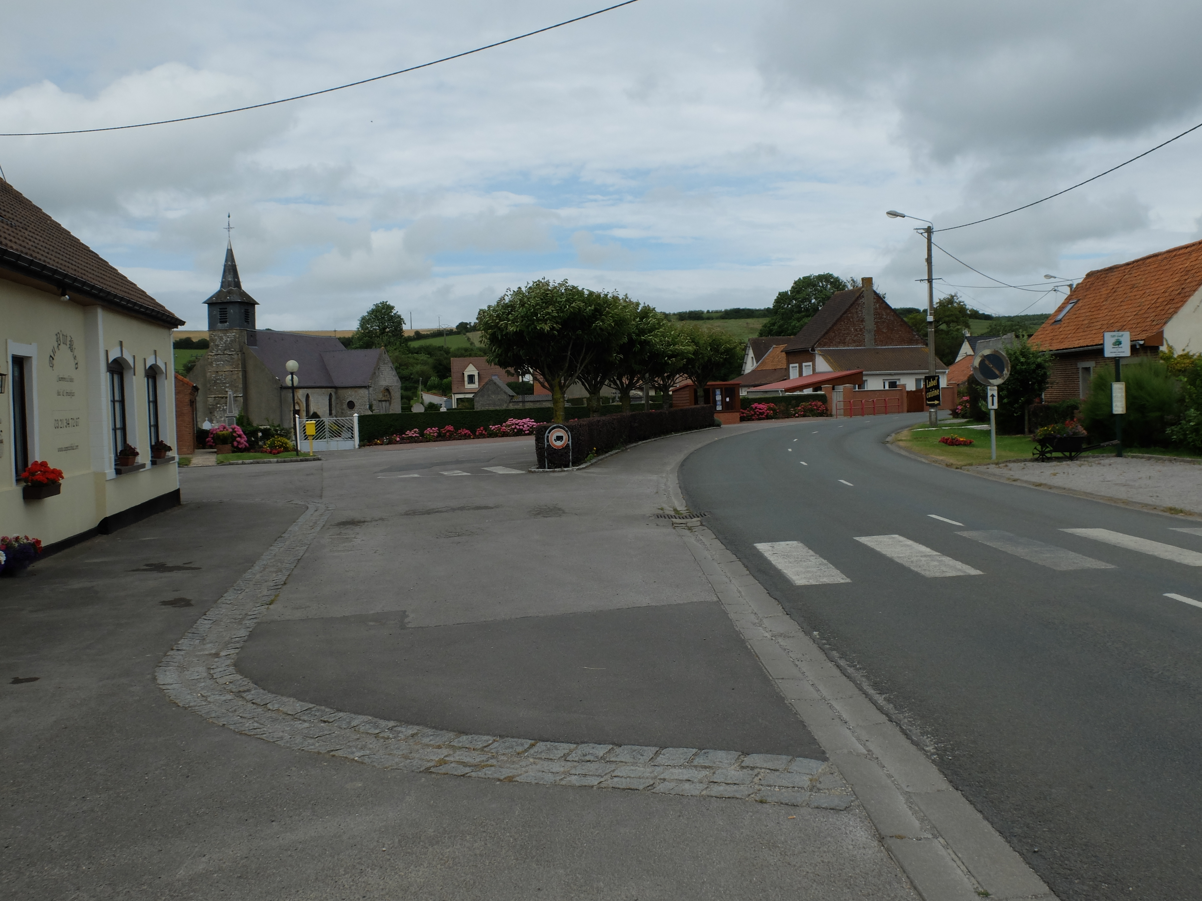 Vue de la place d'Hermelinghen.